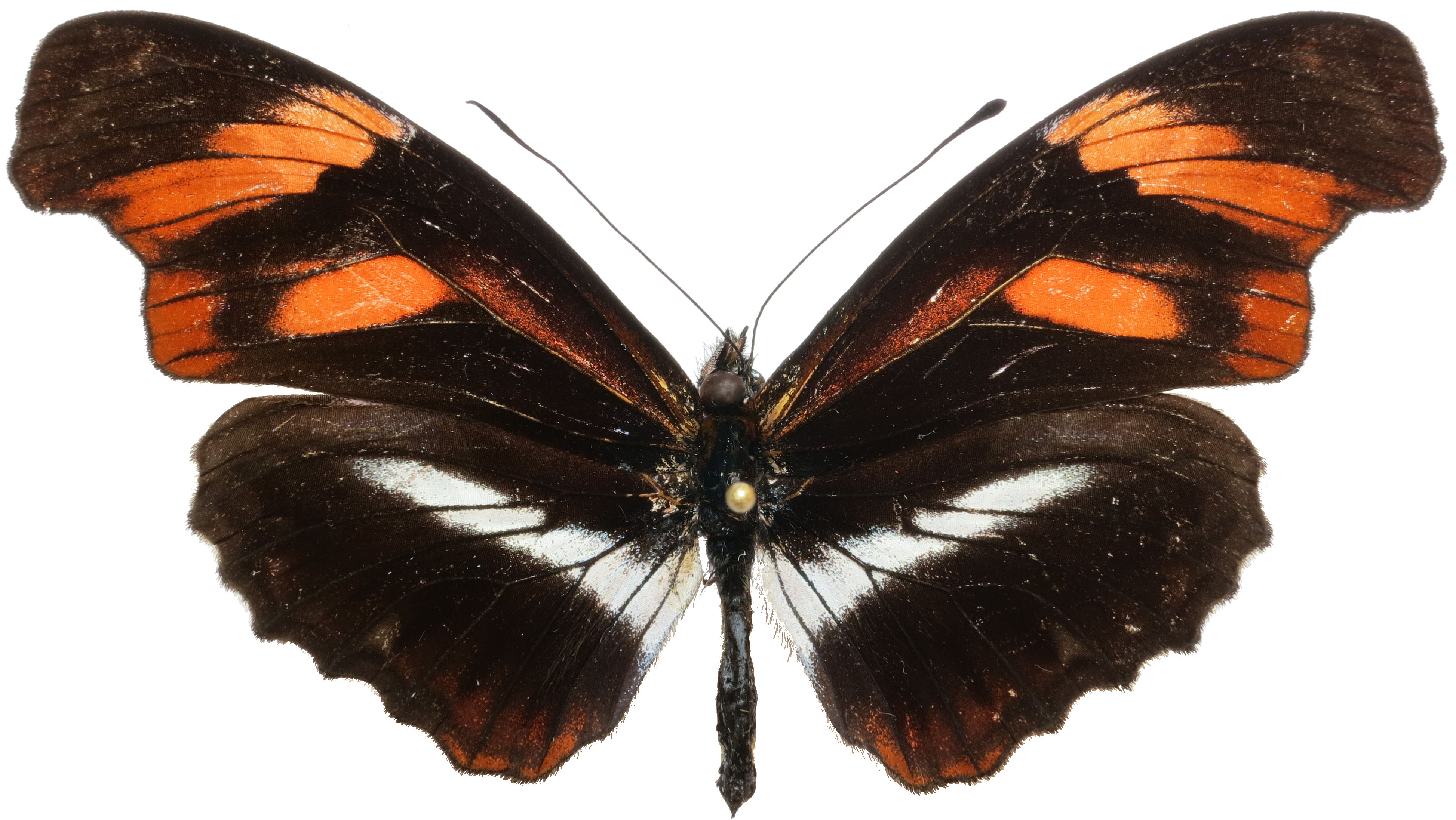 Podotricha telesiphe de Tingo Maria (Huanuco, Pérou) - Octobre 2013